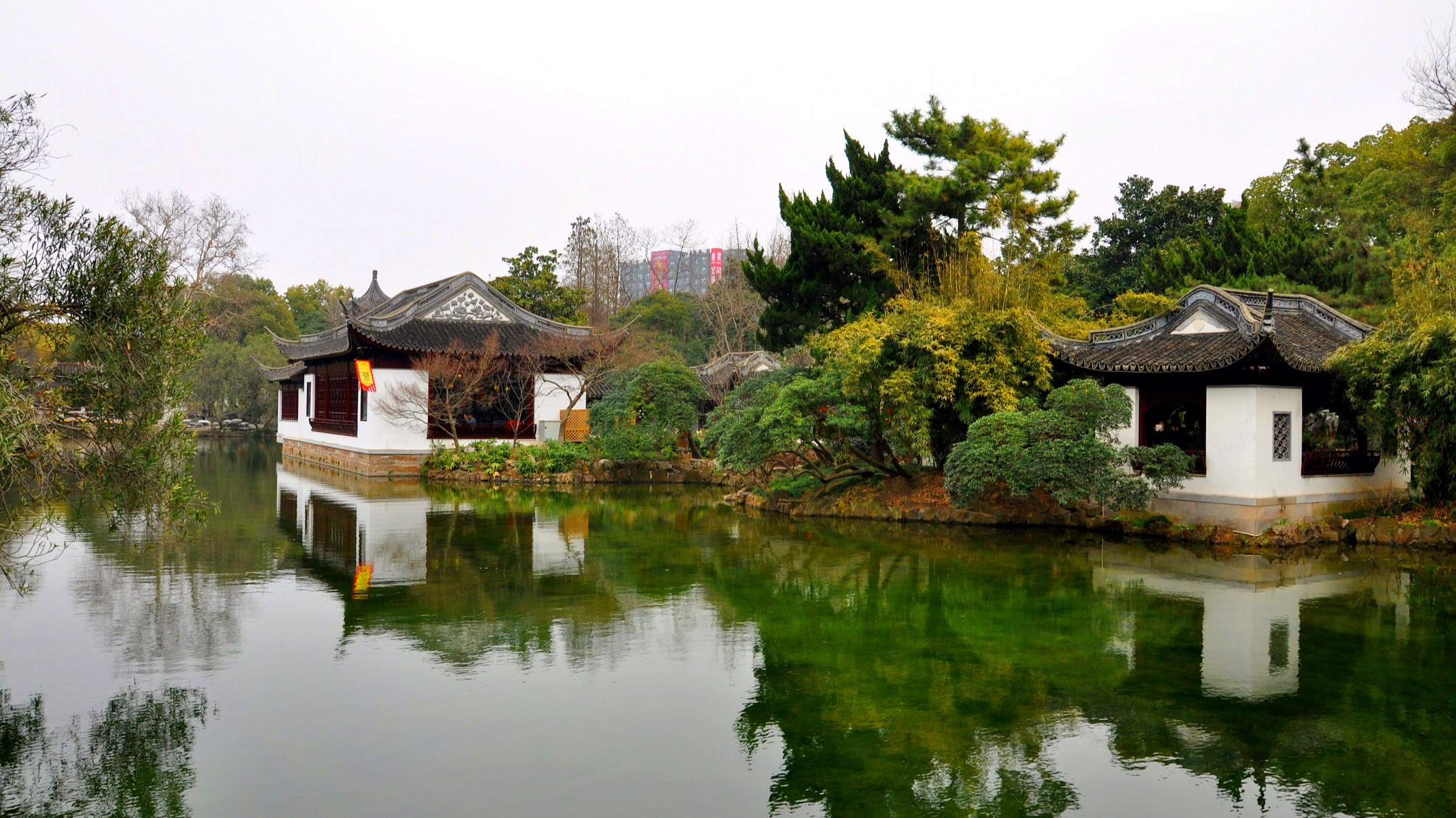 古猗园 南翔镇沪宜公路218号 明至民国